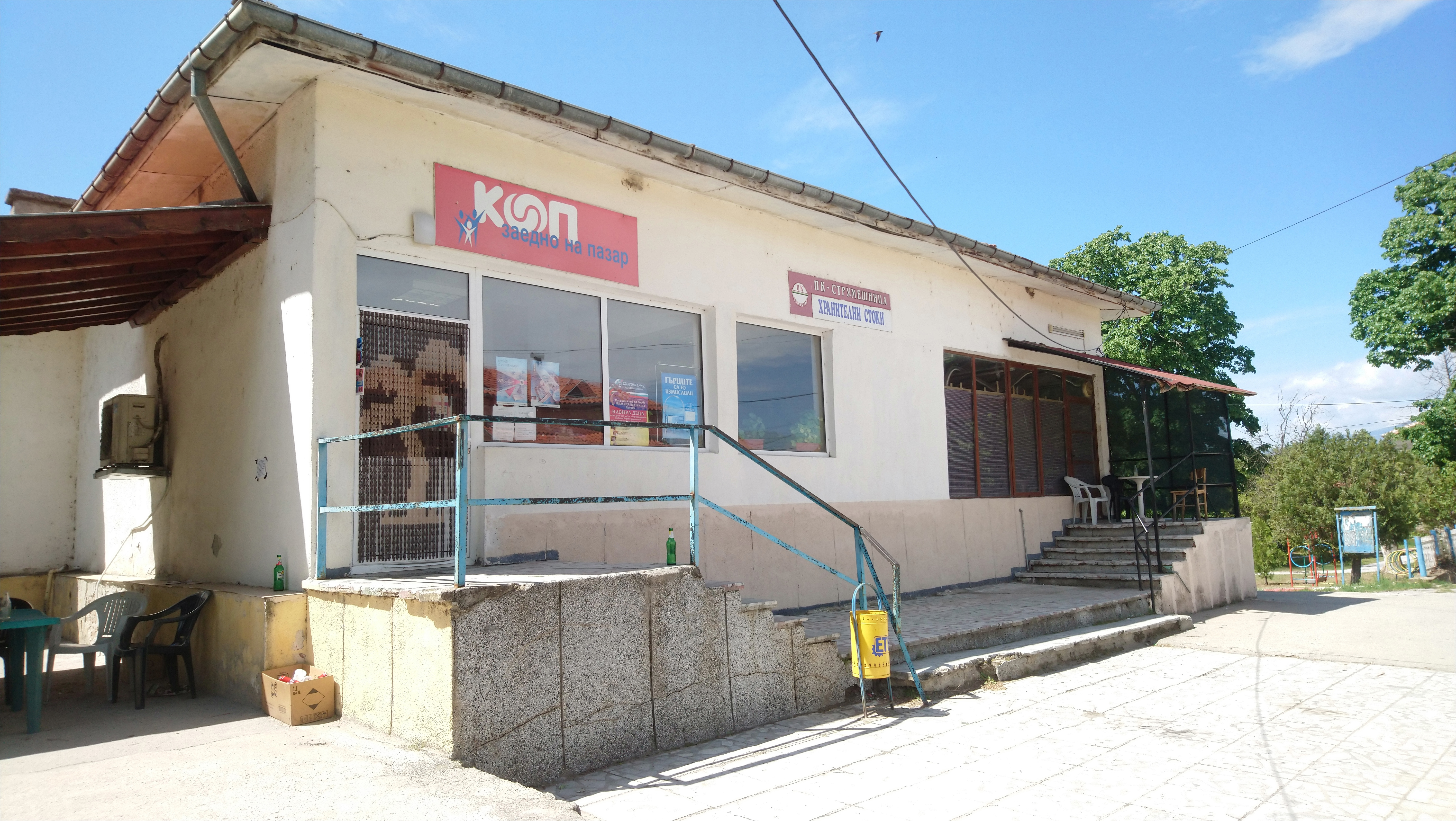 Смесеният магазин на село Марино поле